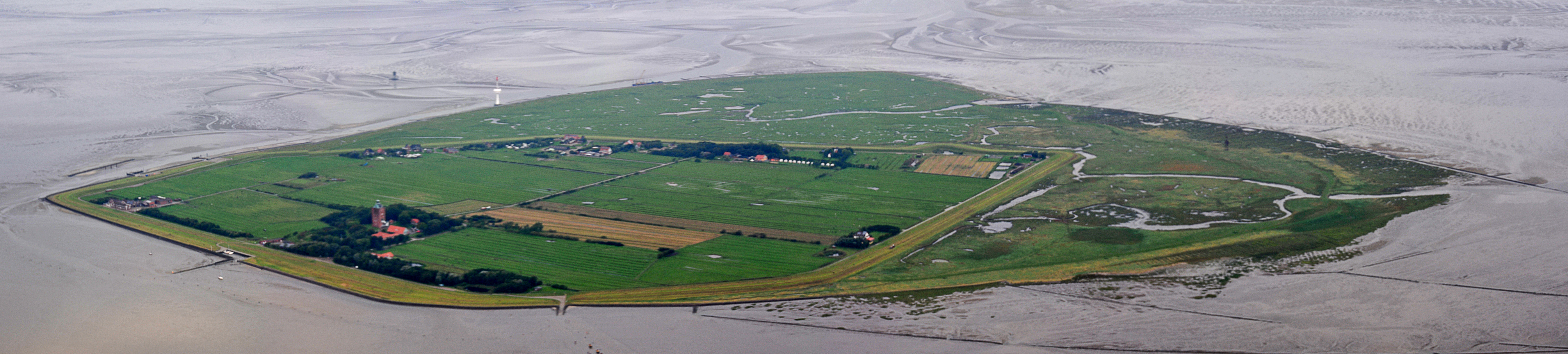 Fotoflug Nordsee; Neuwerk